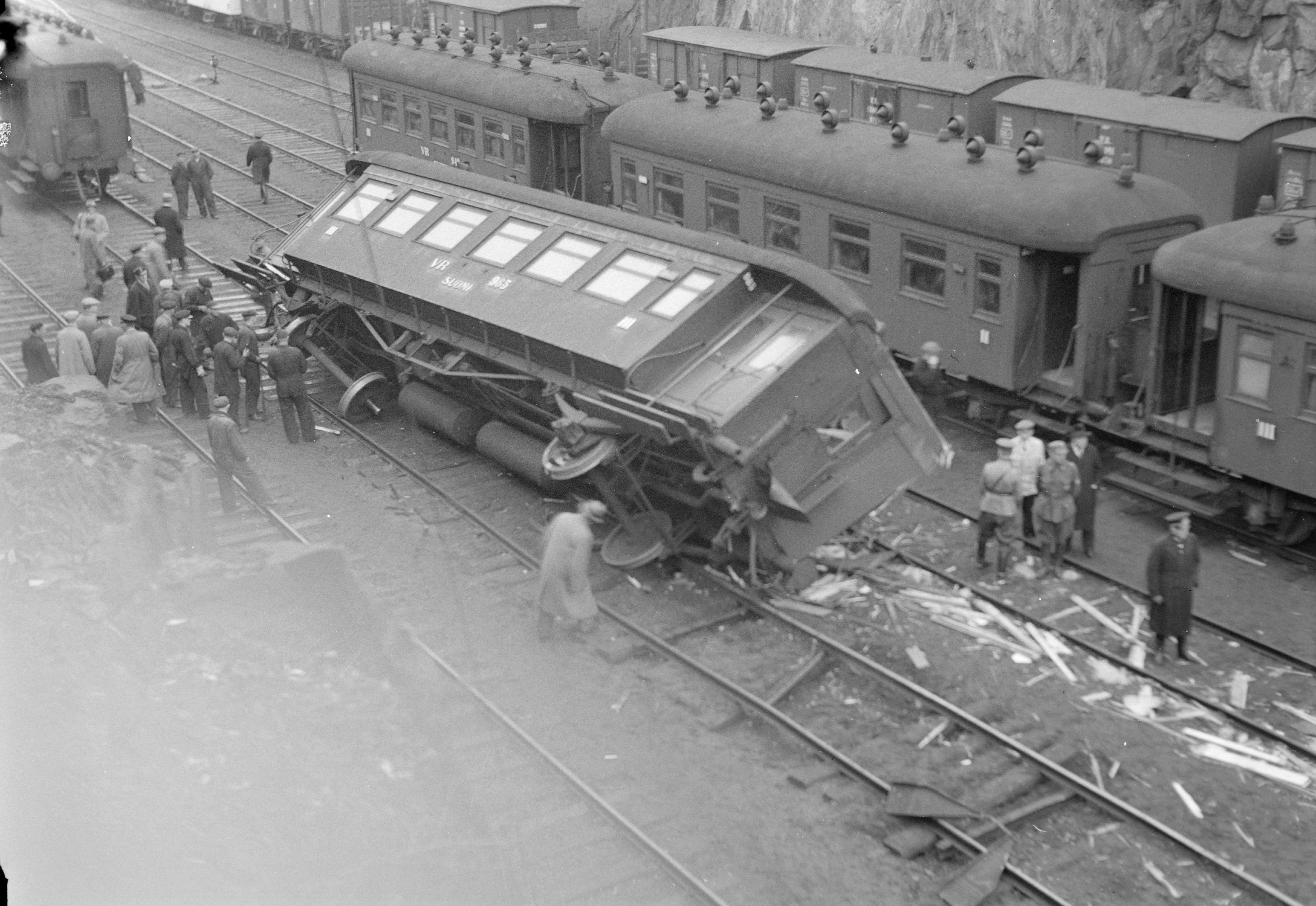 Junaonnettomuus Linnunlaulun kohdalla Helsingissä 13.10.1936